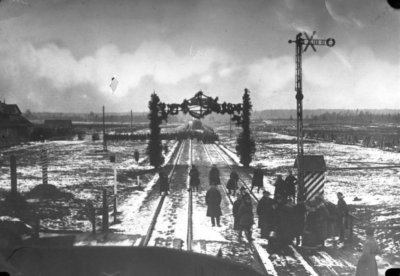 An der russisch-polnischen Grenze ! Auf Grund besonderer Abmachungen tauschten Polen und Russland eine grosse Anzahl politischer Gefangene aus. Polnisches und russisches Militär an der Grenze in Luneney in Erwartung des Austausch-Transportes.